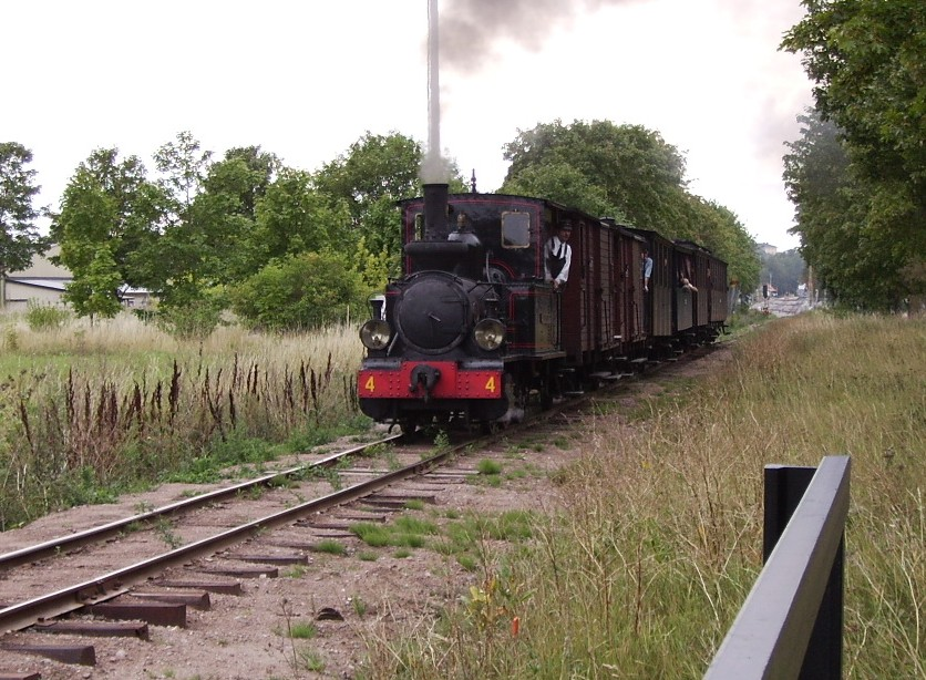 Steam engine BLJ 4 "Långshyttan" leaving Uppsala Ö